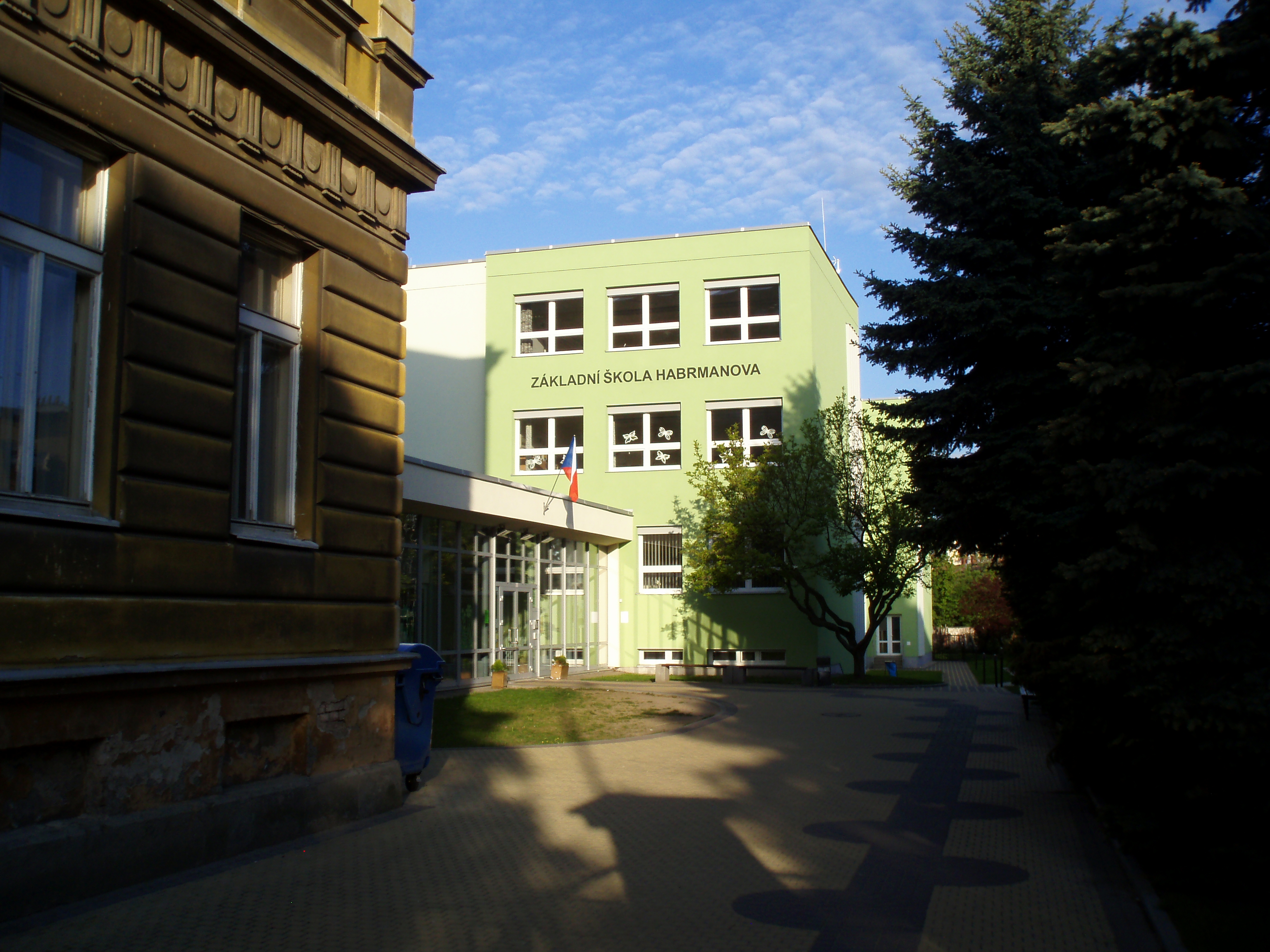 ZŠ Habrmanova (Hradec Králové)